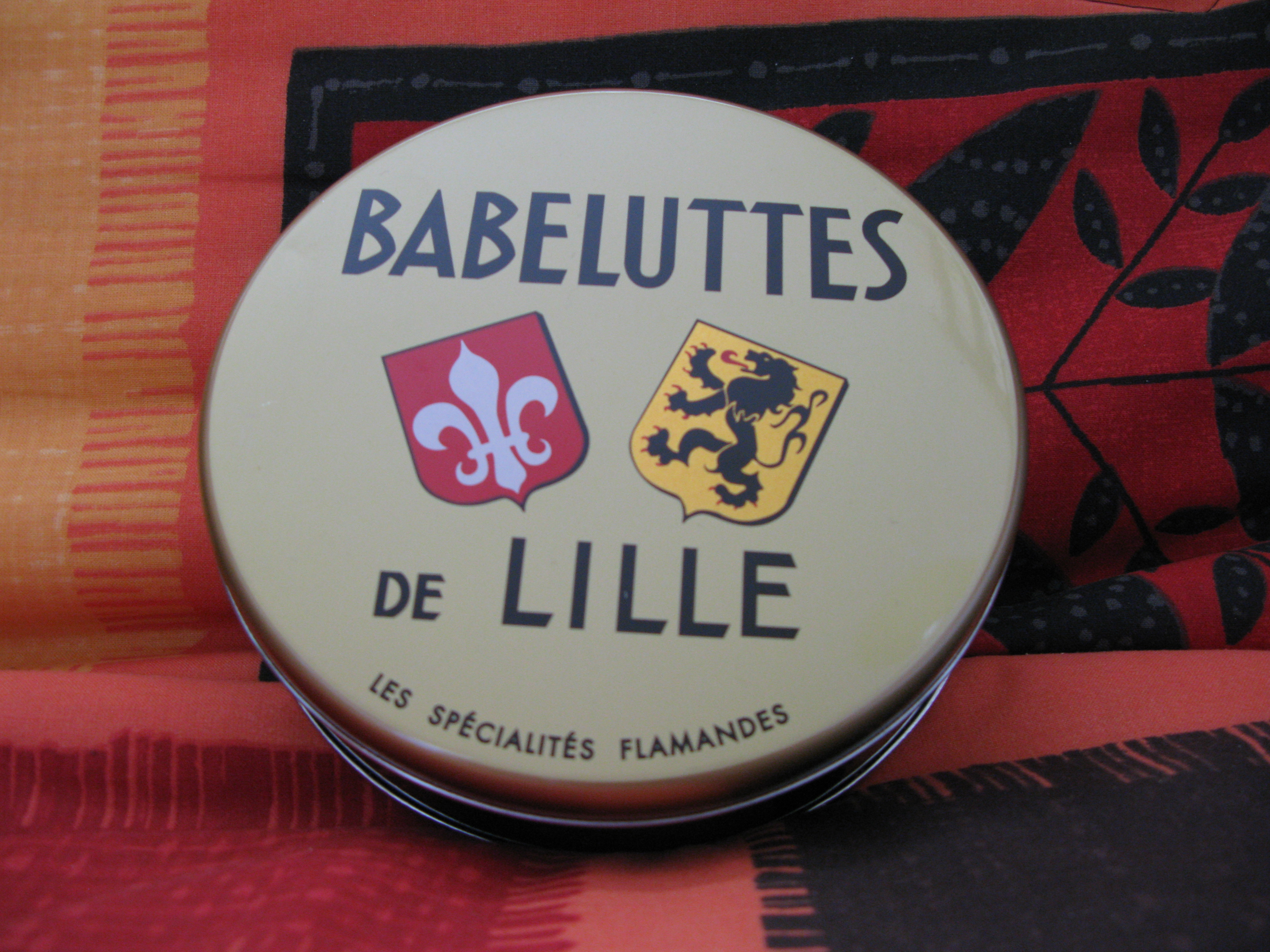 Boite de Babeluttes de Lille.